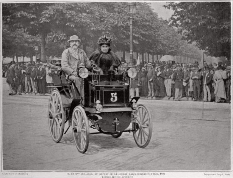 Voiture d'Émile Levassor, arrivée première de la course Paris-Bordeaux-Paris de 1895.